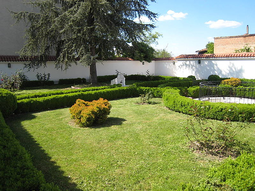 Edirne, Turkey